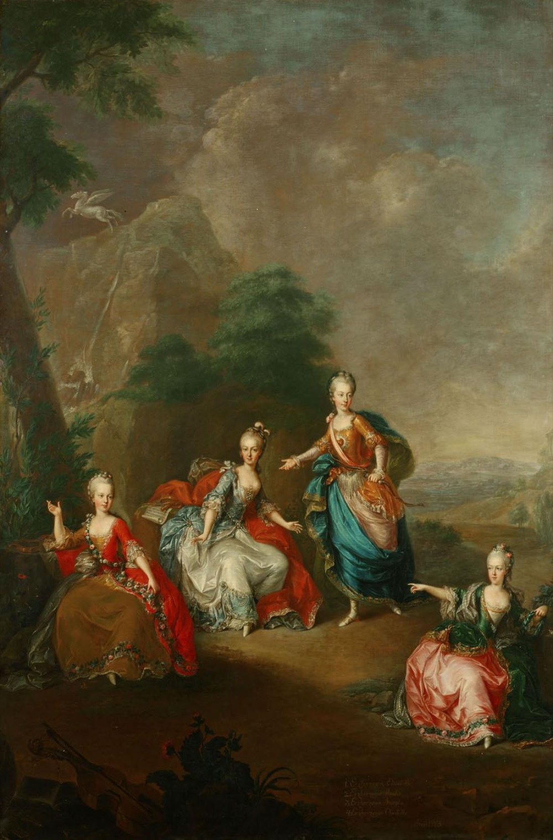 Erzherzogin Amalie den Apollo, Elisabeth die Muse Melpomene, Josepha die Euterpe und Charlotte die Erato.